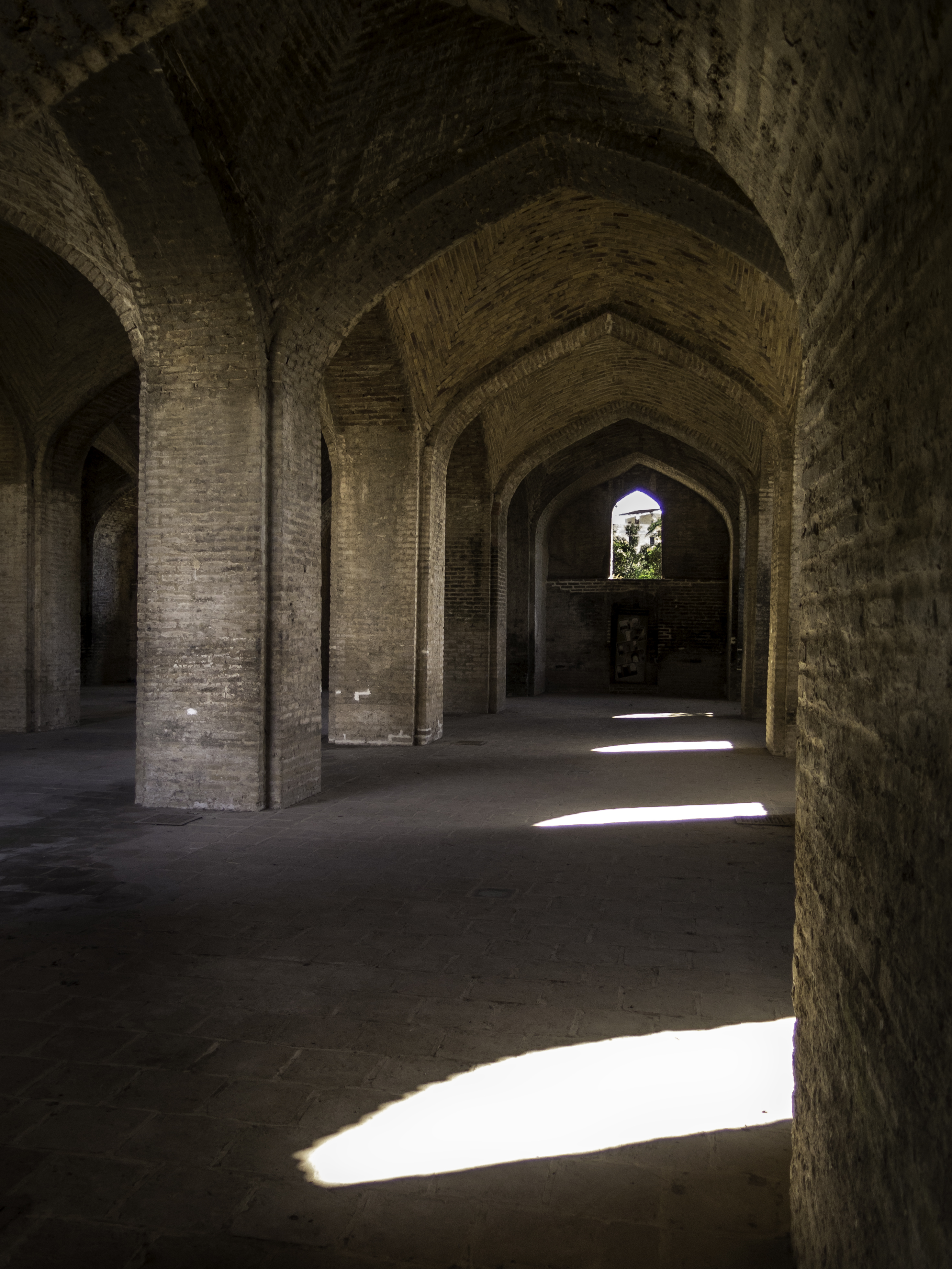 (Farah Abad's Mosque)مجموعه تاریخی فرح‌آباد